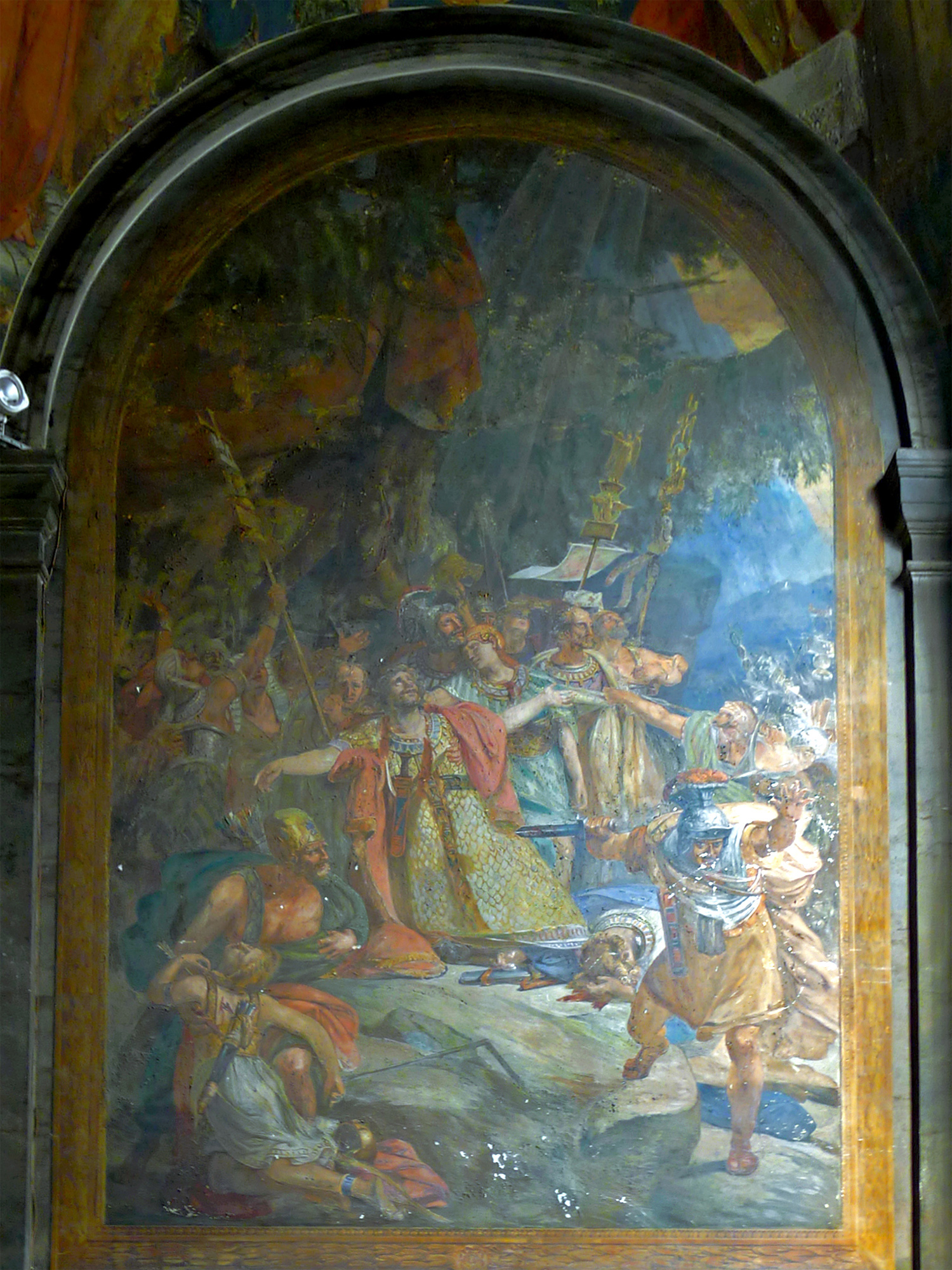 Église Saint-Sulpice : peinture à fresque "Saint Maurice et ses compagnons massacrés par l'armée romaine" du peintre Auguste Vinchon. Chapelle St-Maurice-et-Ste-Jeanne d'ArcParis VI